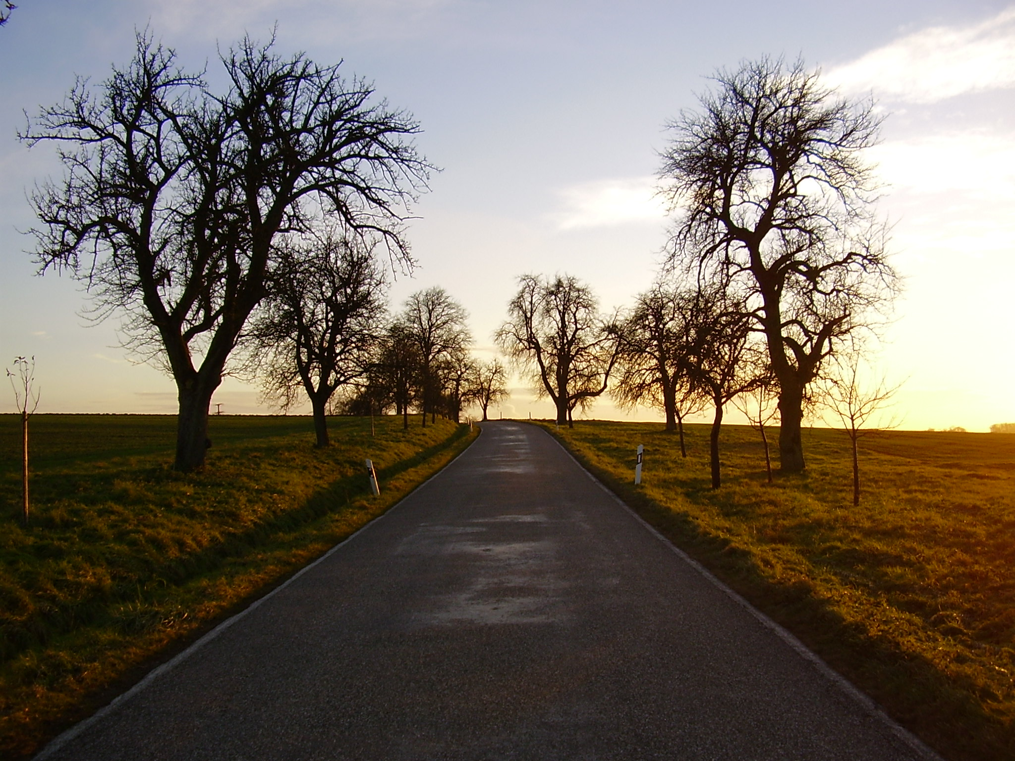 Kreisstraße K2023 Korb-Möckmühl